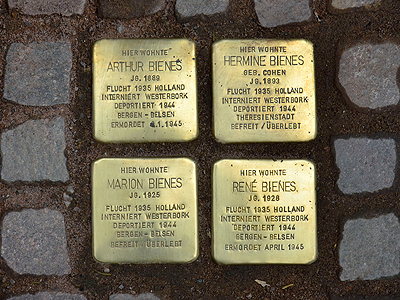 Stolpersteine Sophienstr 12 Fam Bienes